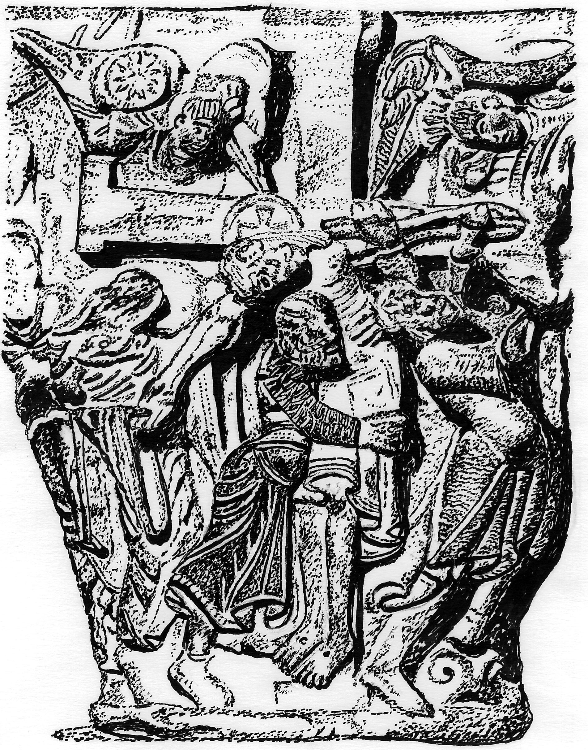 Kapitellplastik der Kreuzabnahme aus dem Kreuzgang der Kathedrale von Pamplona. Jetzt im Museo de Navarra. Um 1145.